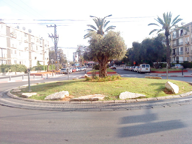 כיכר גיתית